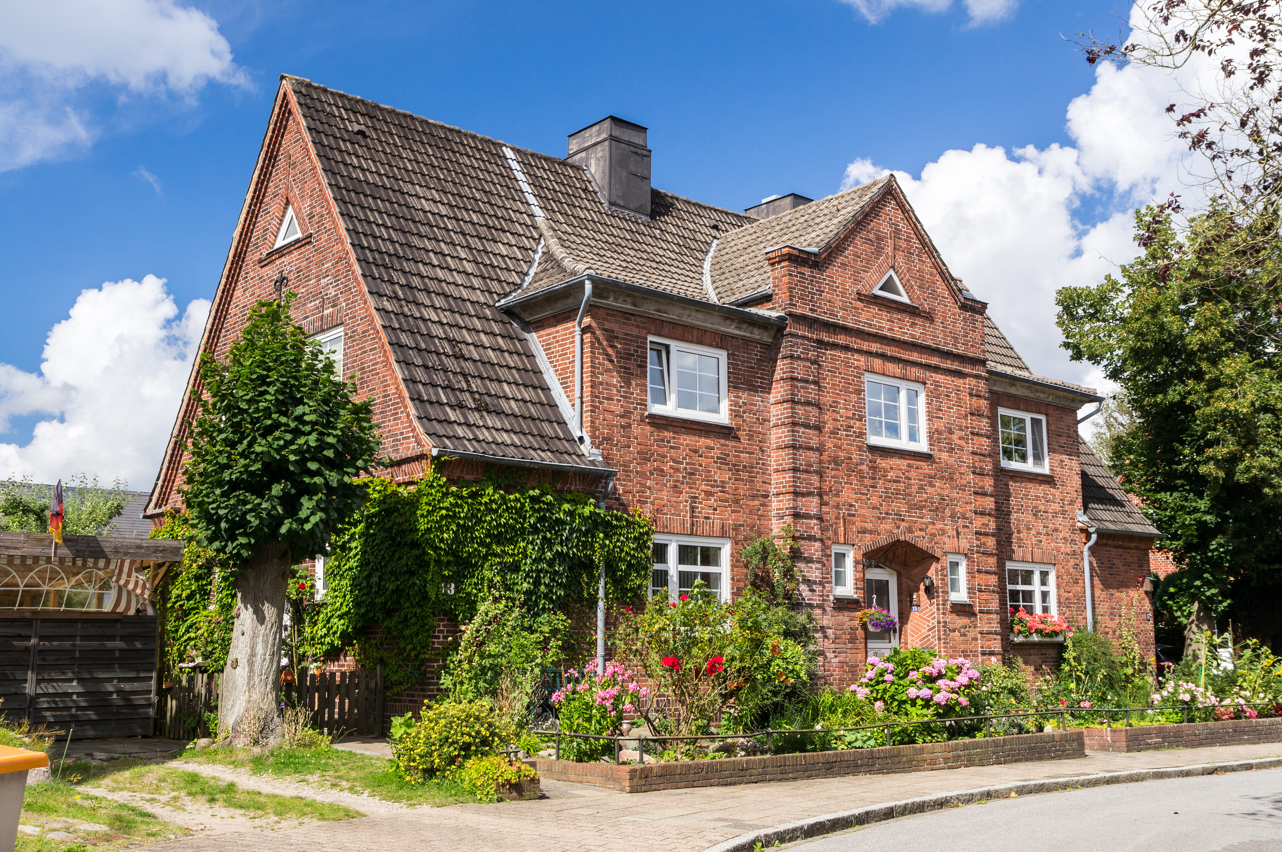 Flensburg-Mürwik; Parkhof 13-17; Dreifamilienhaus; Denkmal-Nr. 18